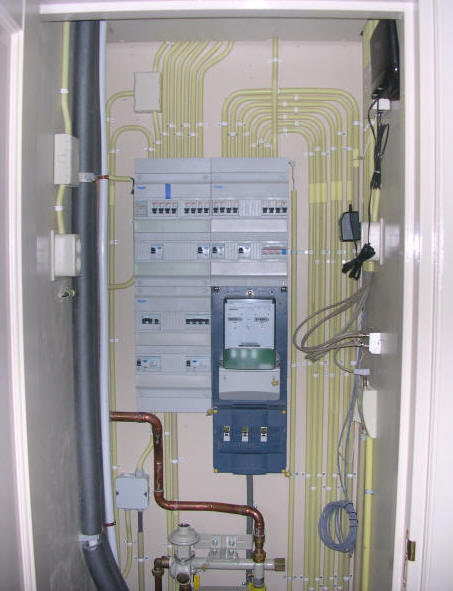 Groepenverdeler van een vrijstaande woning bouwjaar 2002